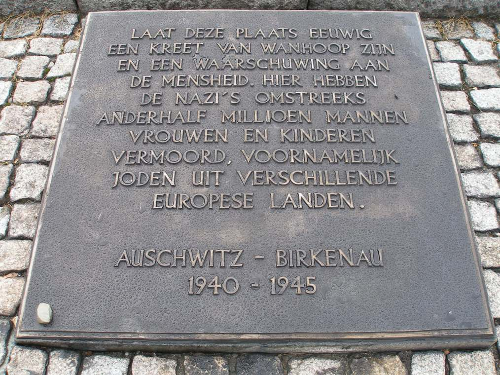 Gedenkplaat in Auschwitz II (Birkenau).